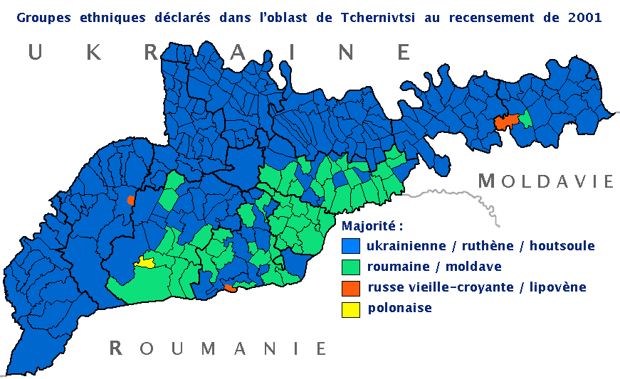 Groupes ethniques de l'Oblast de Tchernivtsy (Ukraine), avec les "Vieux-Croyants" en rouge (recensement de 2001)